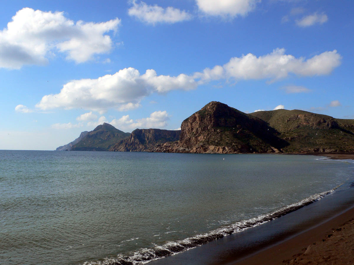 Sierra de la Fausilla vista desde la playa de la Bahía de Portmán en La Unión (España)